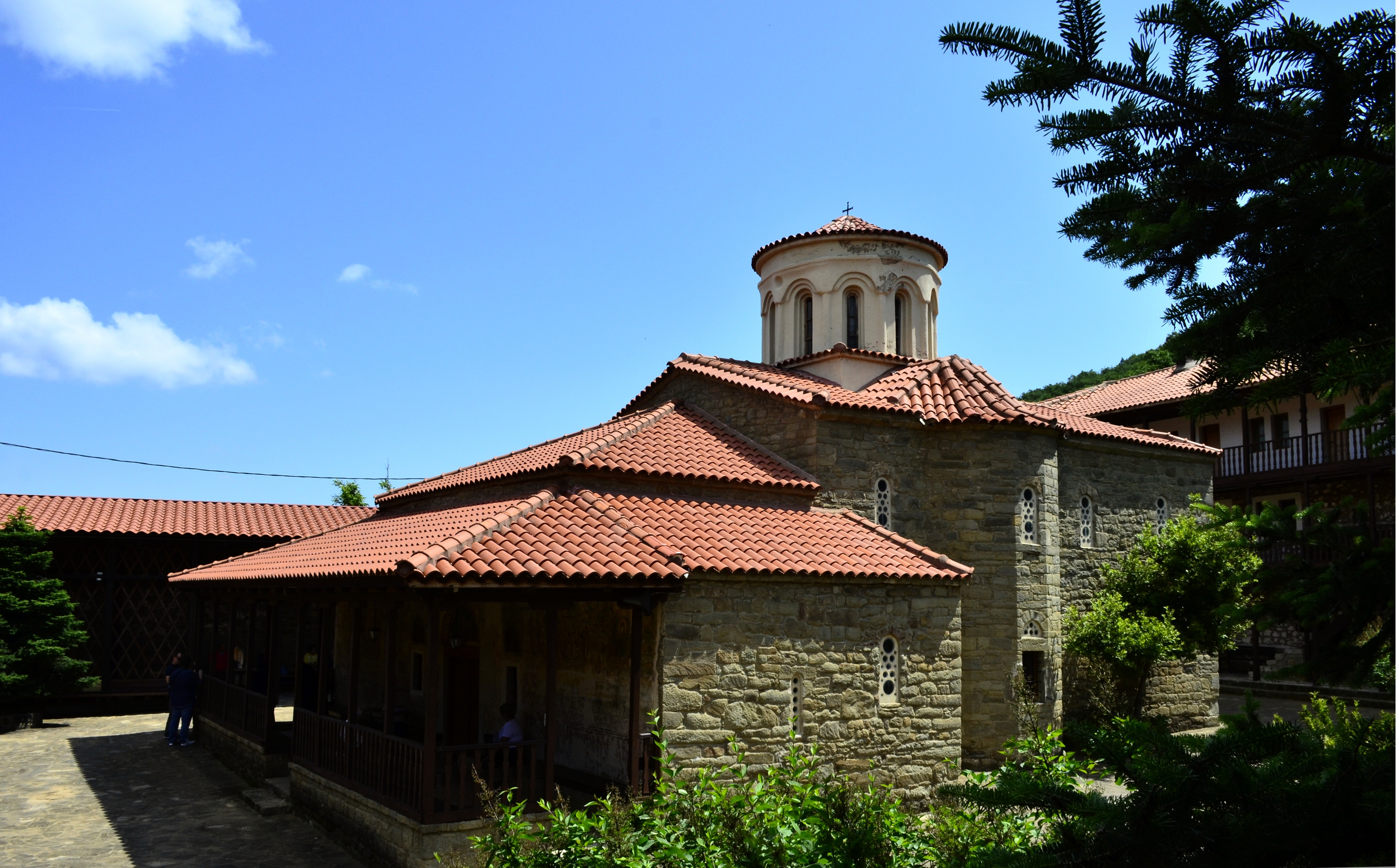 Ρεντίνα Καρδίτσας Ιερά Μονή Κοιμήσεως της Θεοτόκου.